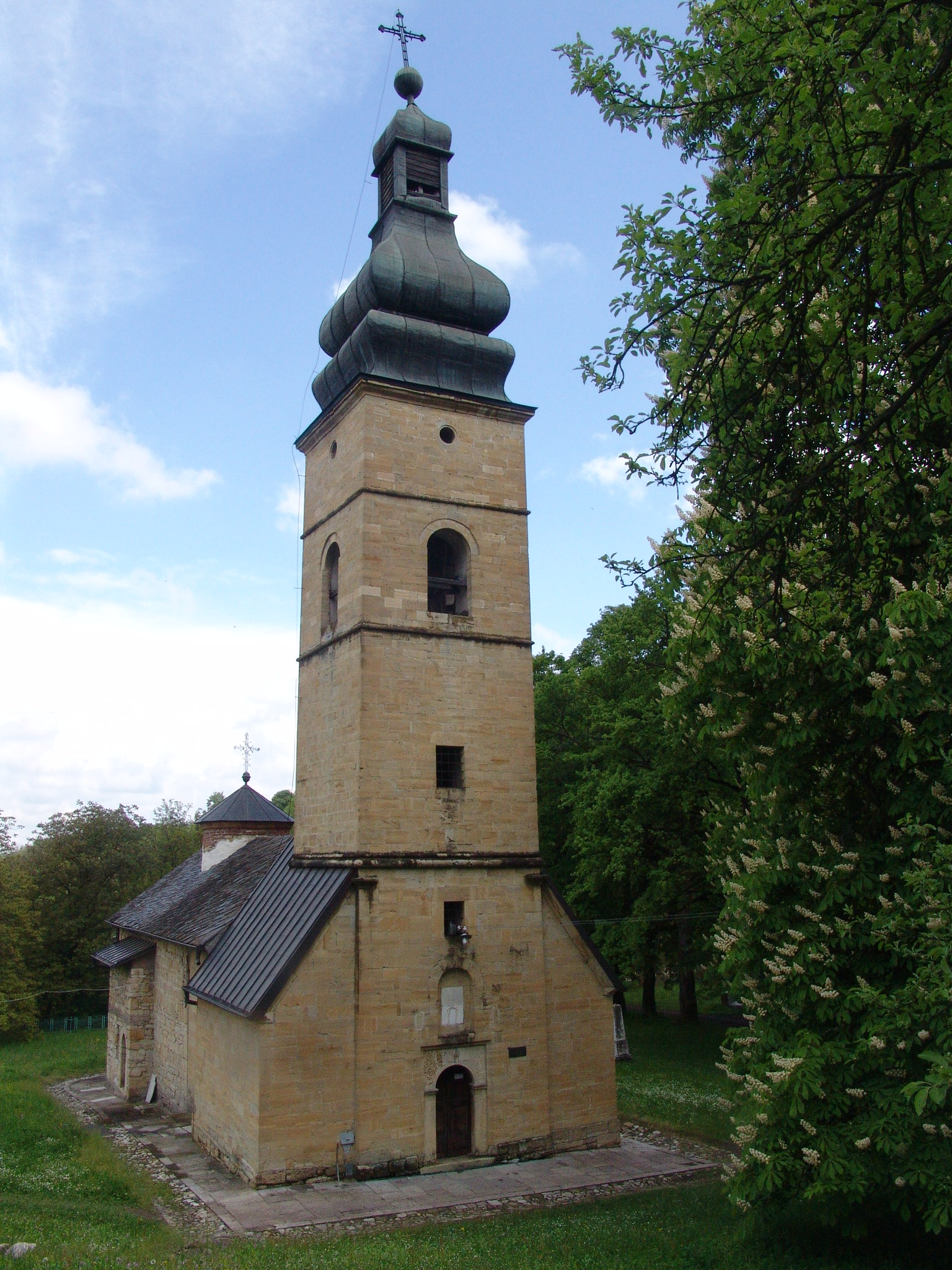 Ја, творац ове слике, предајем је у јавно власништво. Ово се односи на цео свет.